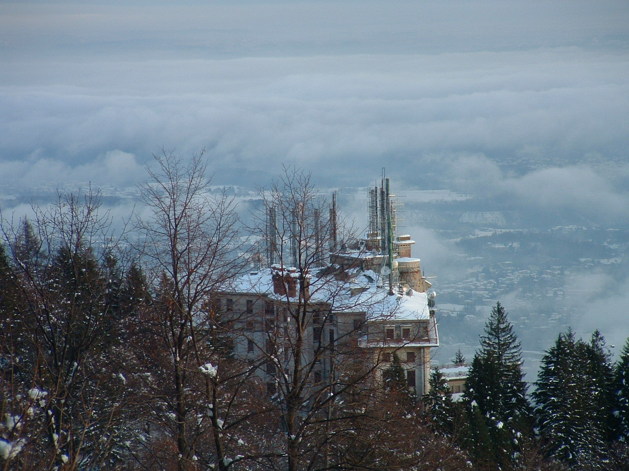 Grand Hotel Campo dei Fiori (Varese), architect: Giuseppe Sommaruga